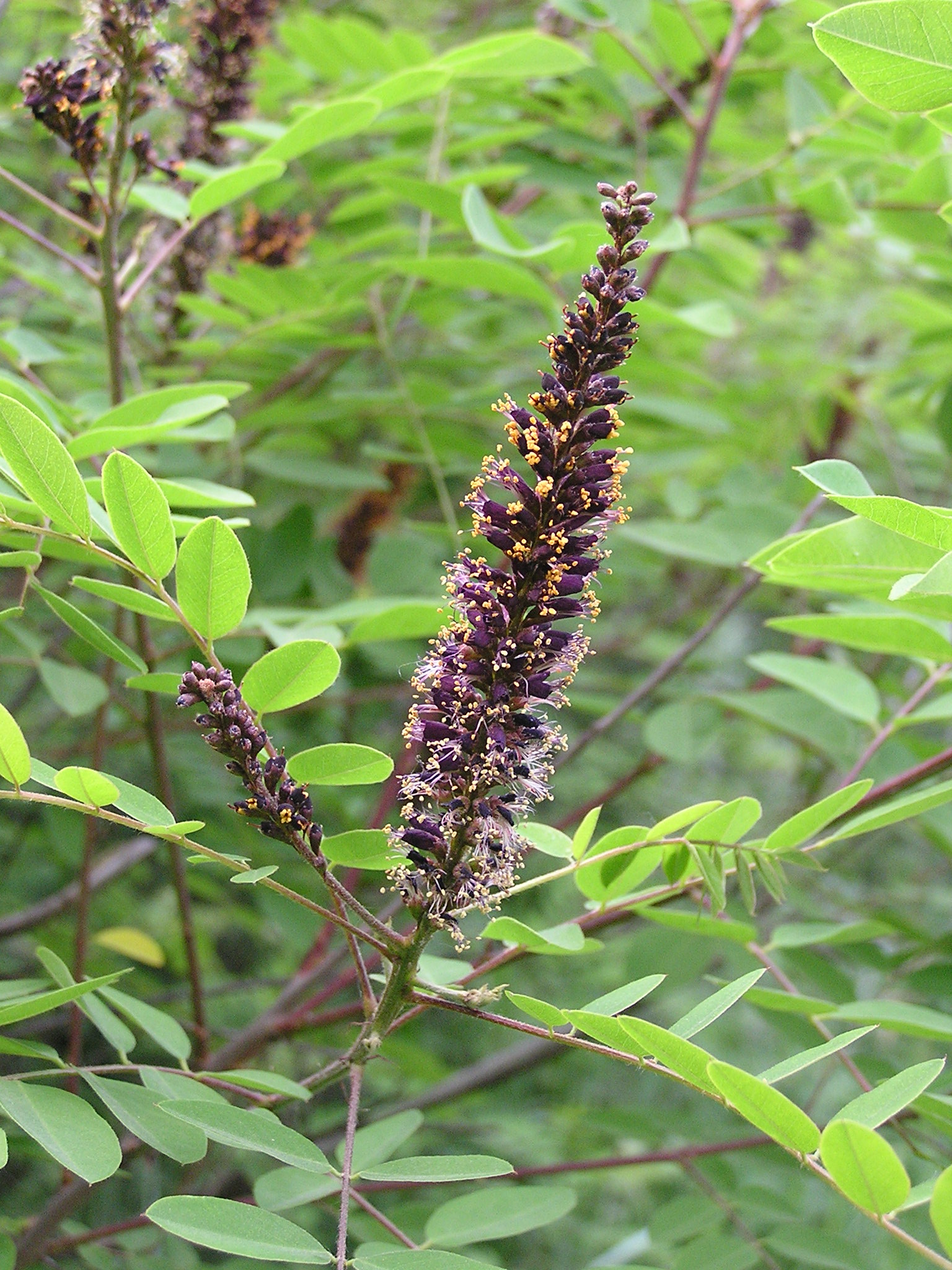 Amorpha fruticosa